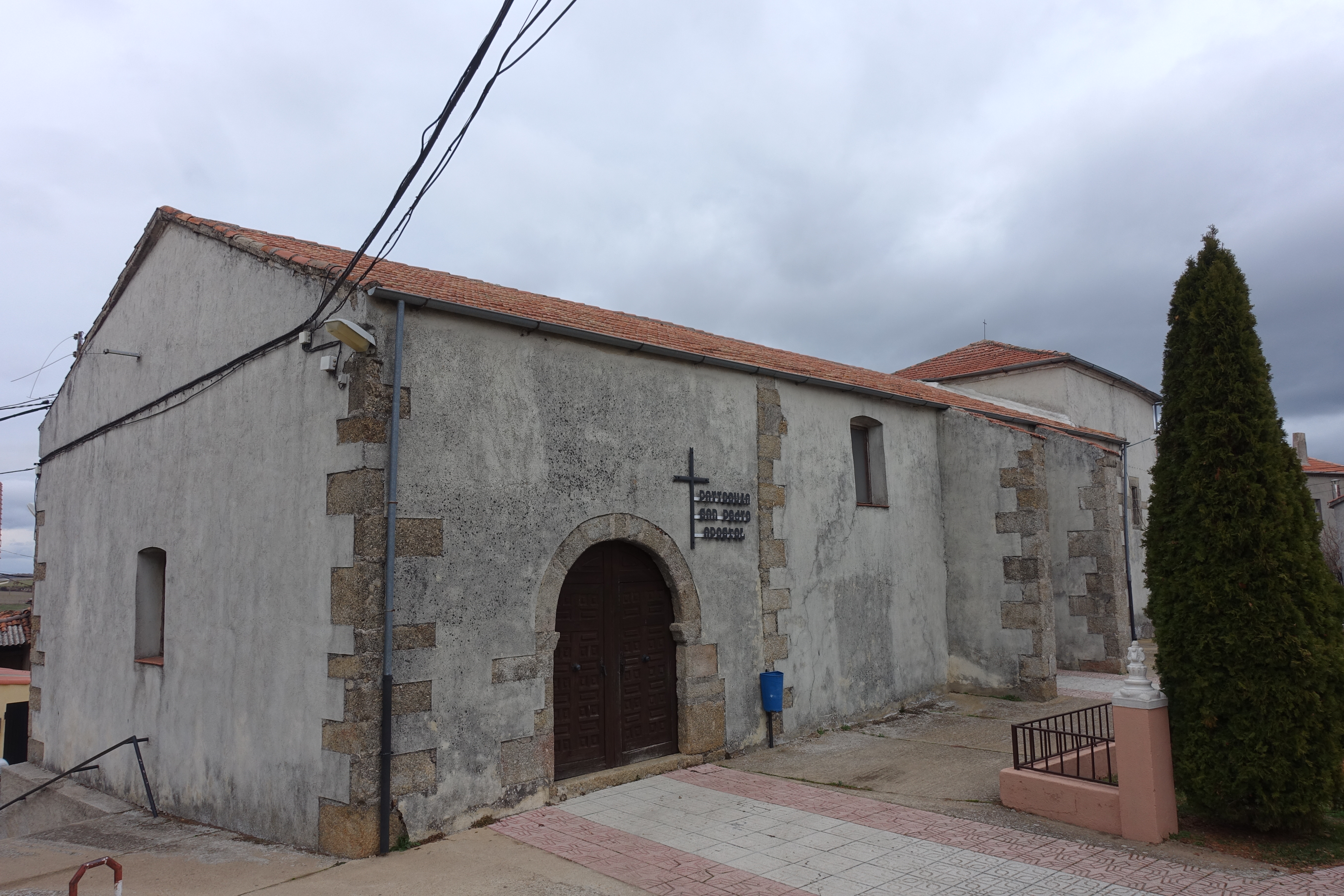 Iglesia de San Pedro Apóstol, Villasrubias (Salamanca, España).